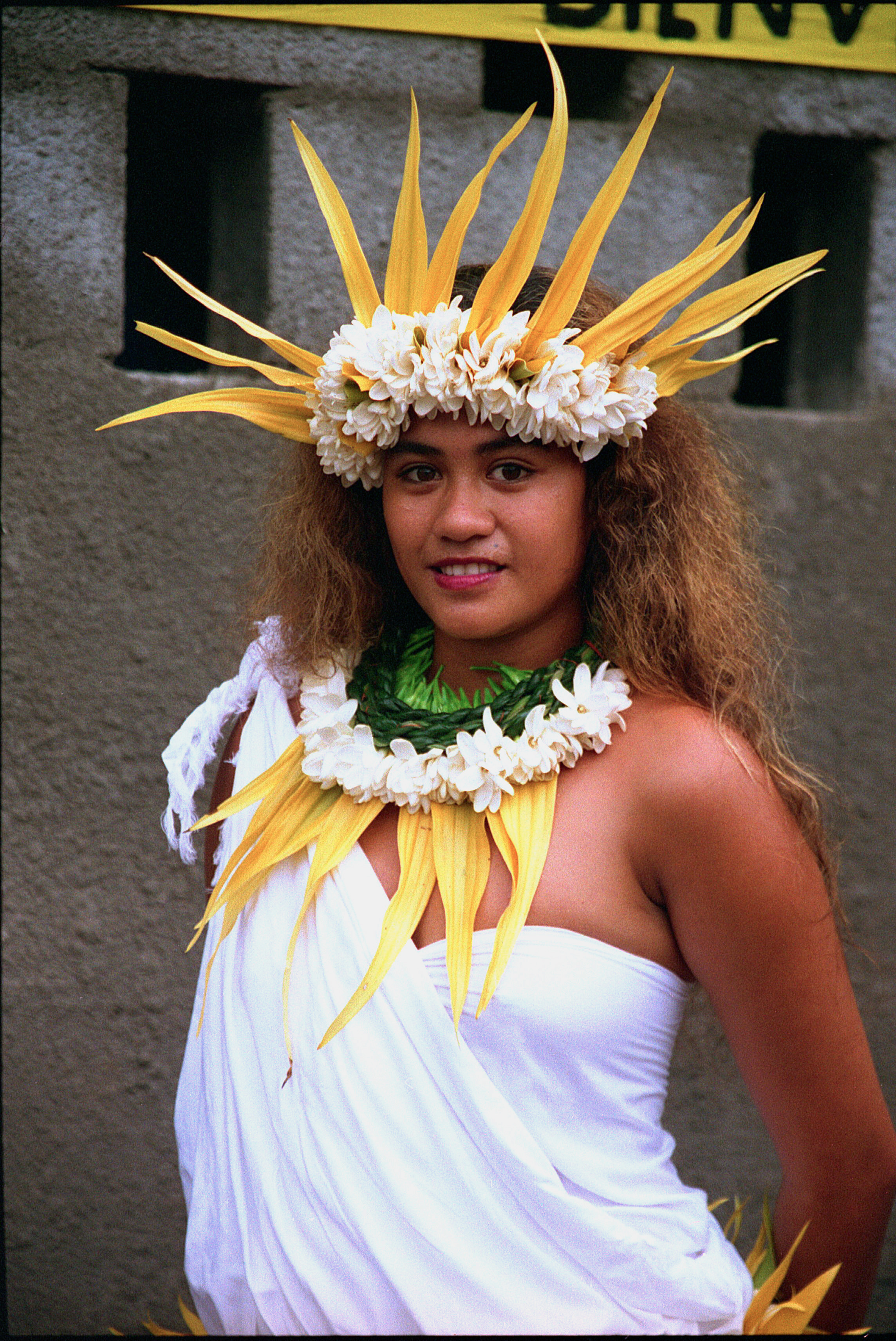 polynésie, iles marquises, danseuse.